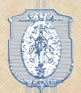 stemma arcivescovato del messico